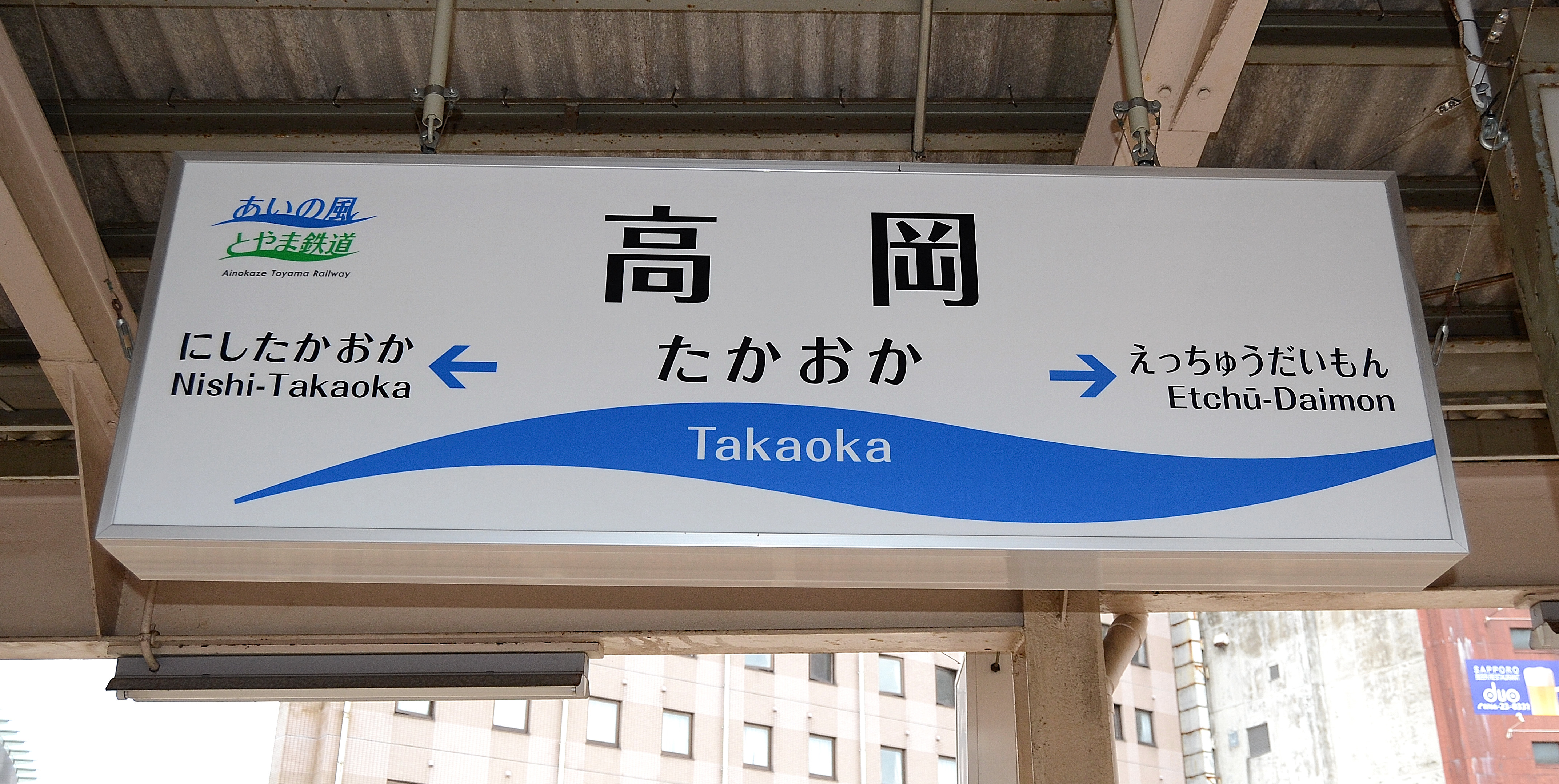 あいの風とやま鉄道線の海側の駅名票。